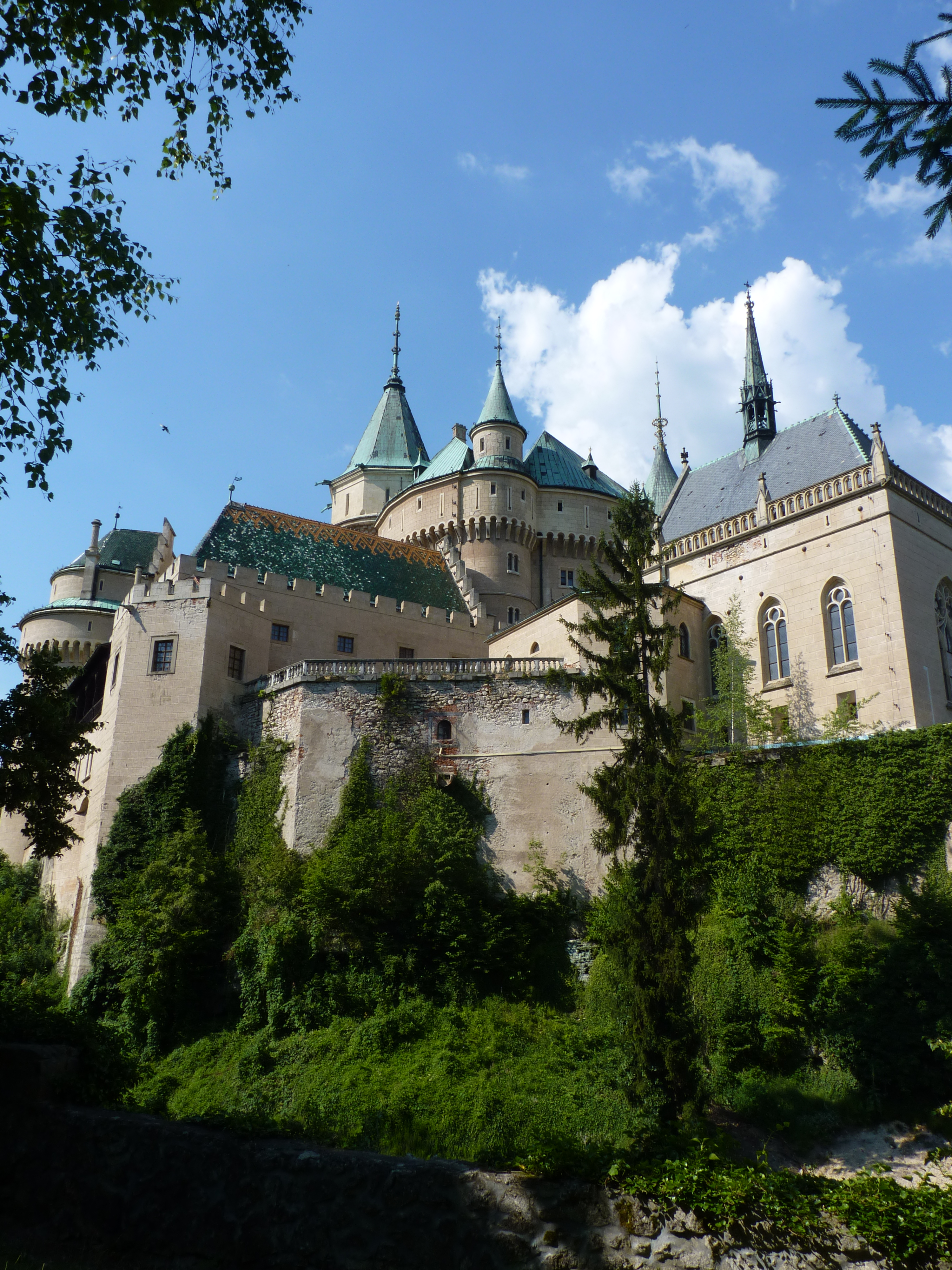 Kaplnka hradná